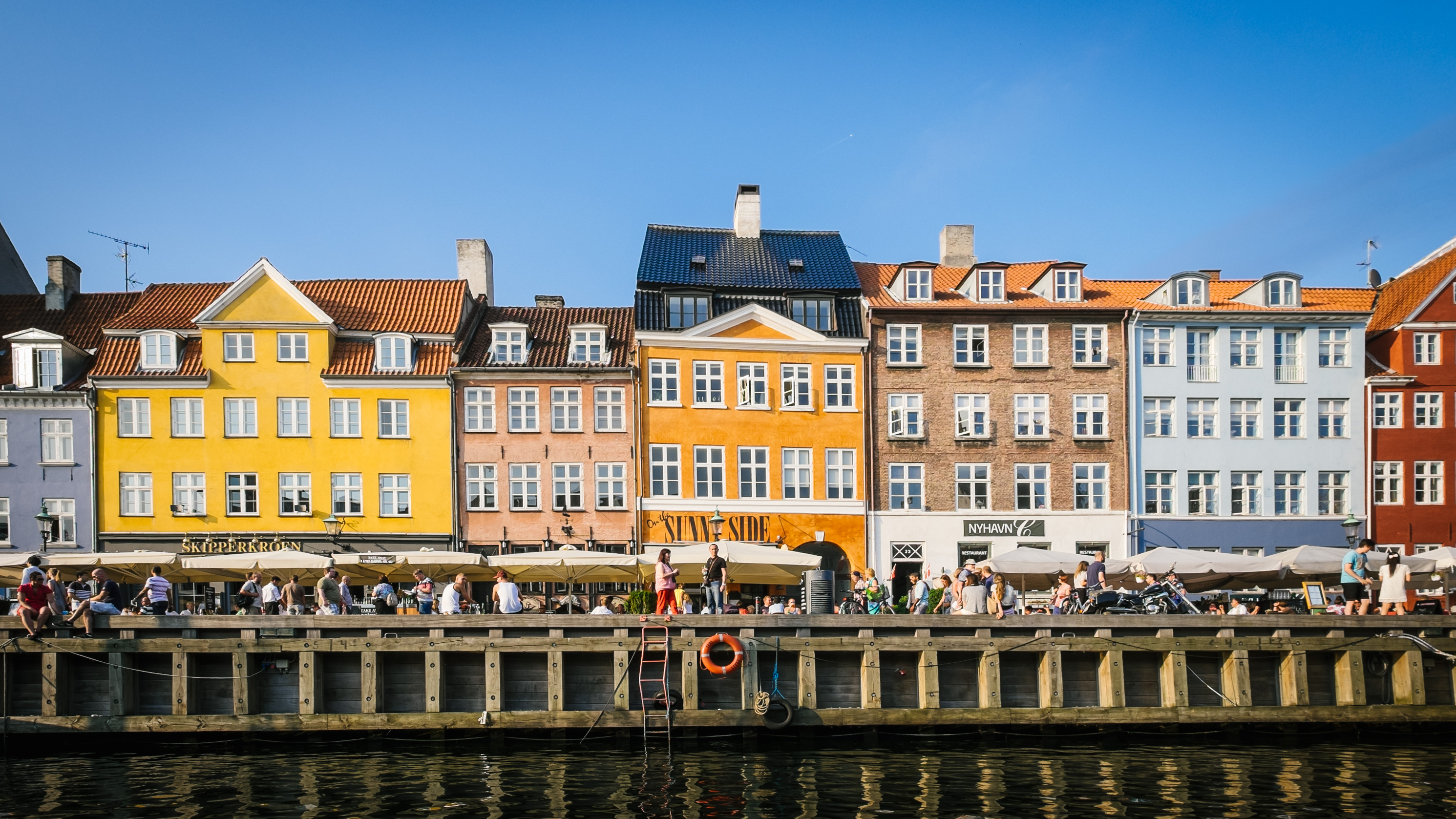 Nyhavn 27-35 in Copenhagen, Denmark